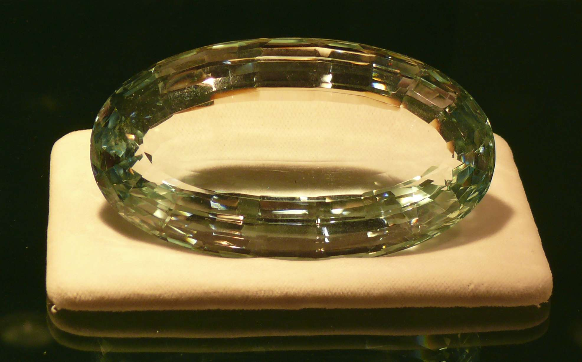 Topas, 2680 ct, Minas Gerais